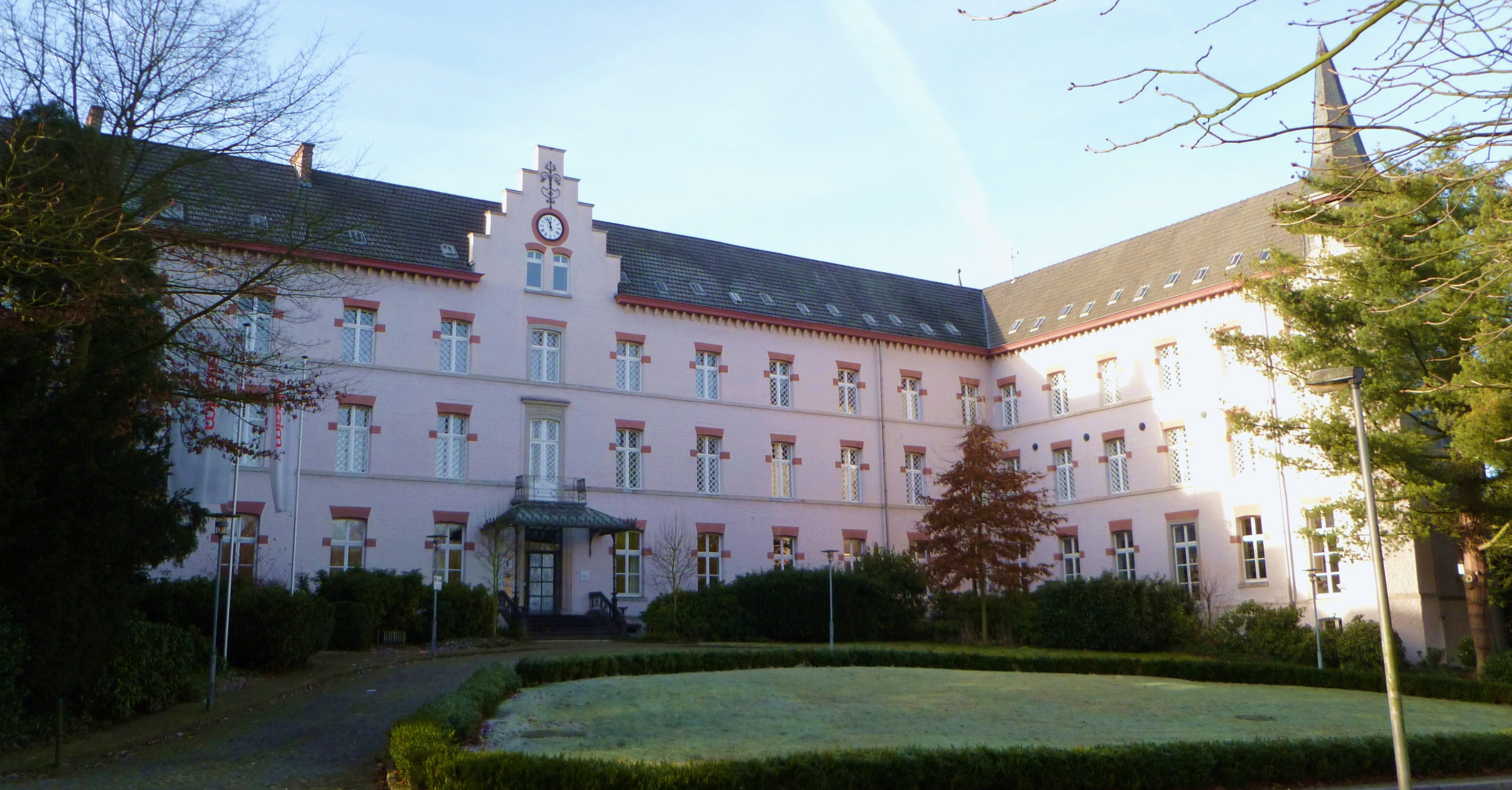 Missio-Gebäude Aachen